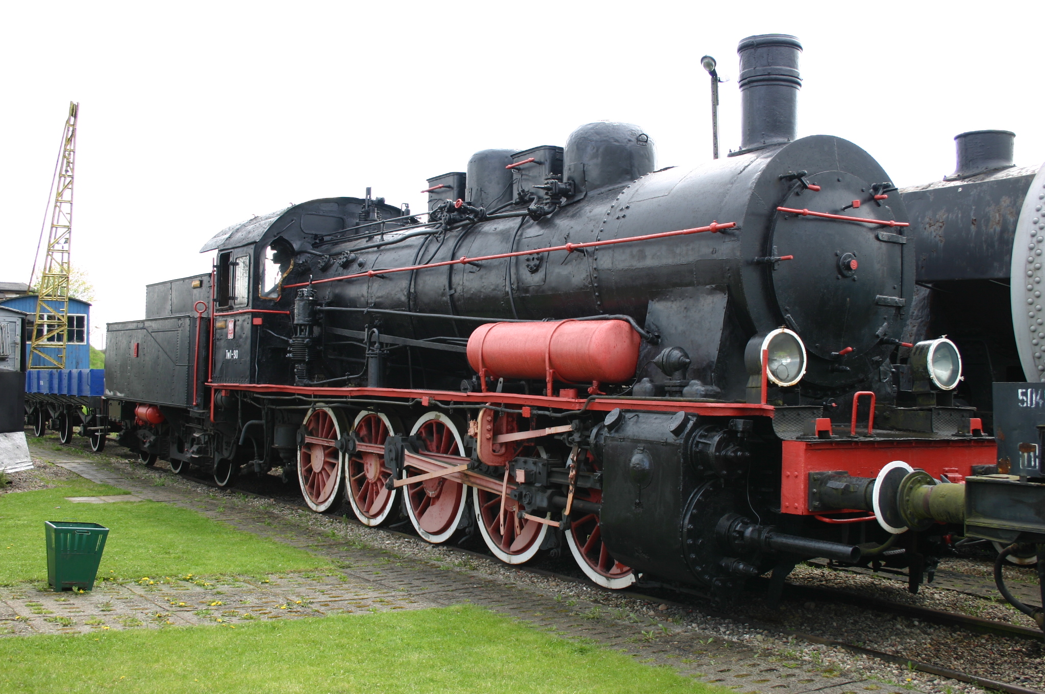 Dampflokomotive Tw 1-90 Koscierzyna 10.05.05